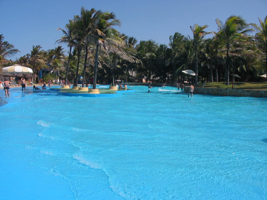 pscina com ondas do beach park, a maior da américa latina